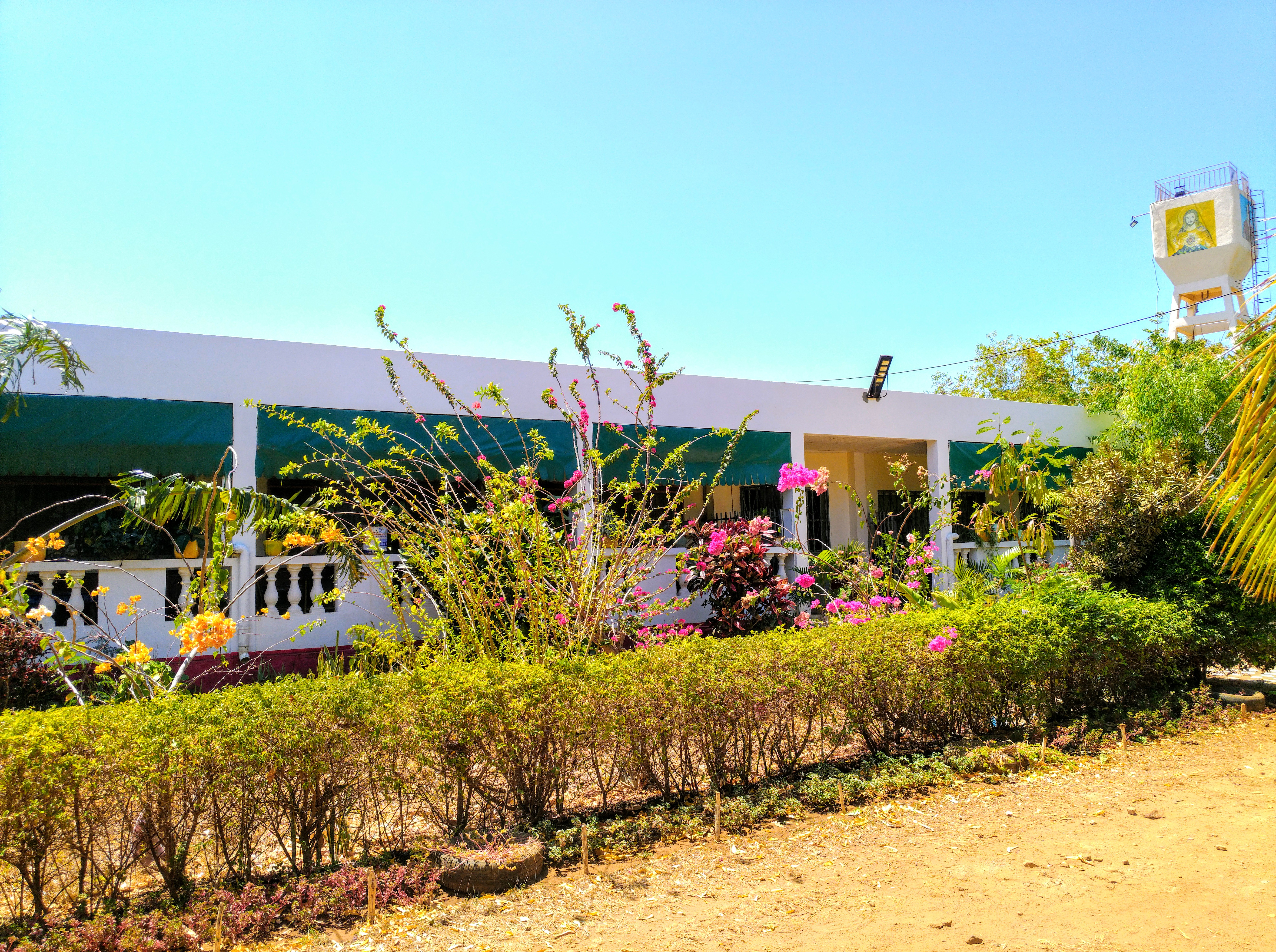 Intérieur de la salle Paul VI au Vatican.